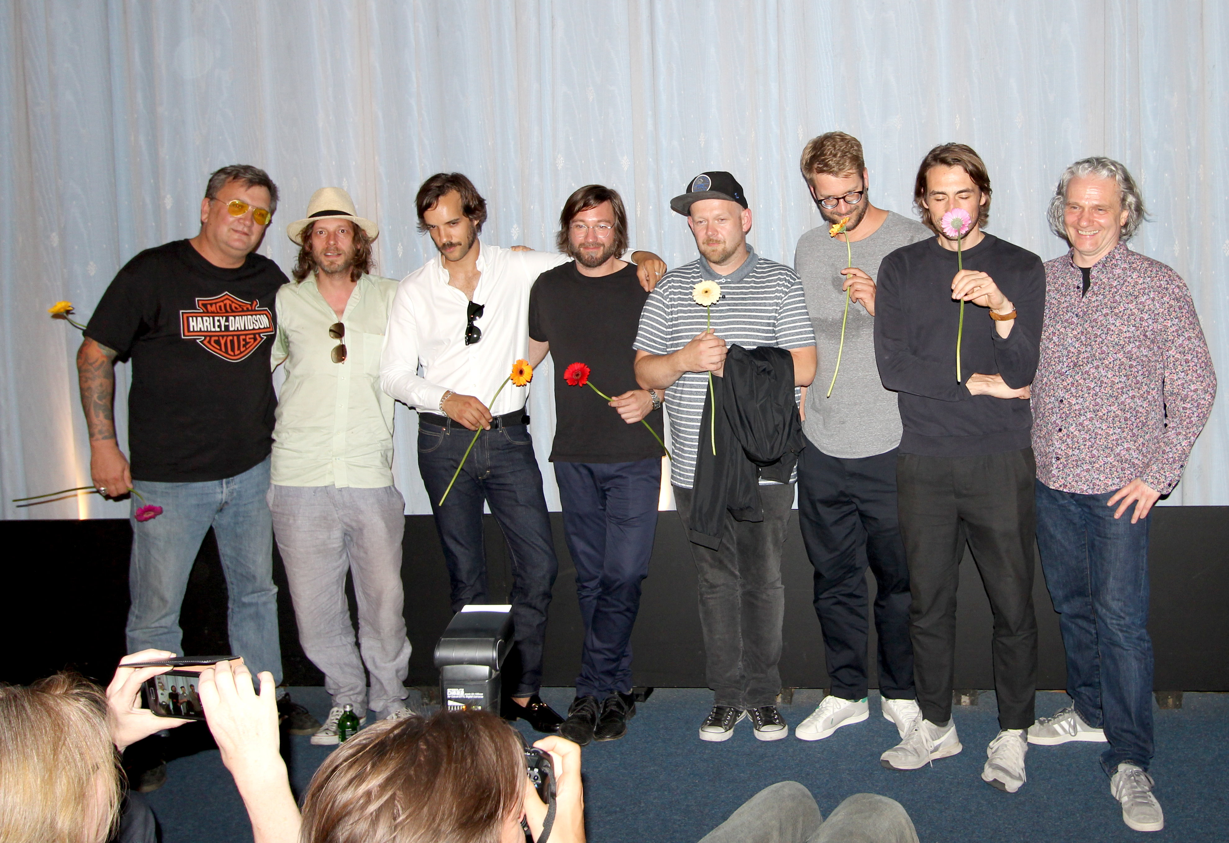 40210 Düsseldorf, Graf-Adolf-Str. 47, Premiere des Films am 05.07.2018 im Atelier-Kino Düsseldorf. Die Band 'Pictures' (ehemals 'Union Youth'). Personen v.l.n.r.: (Mitglied Union Youth), Matthias Exler (Gitarre, Gesang), Markus Krieg (Bass), Michael Borwitzky (Schlagzeug), Ole Fries (Gitarre), Timo Großpietsch (Regisseur), Christian von Brockhausen (Regisseur), Stephan Winkler (W-Film, Filmverleih Köln). Aufnahme 2018.